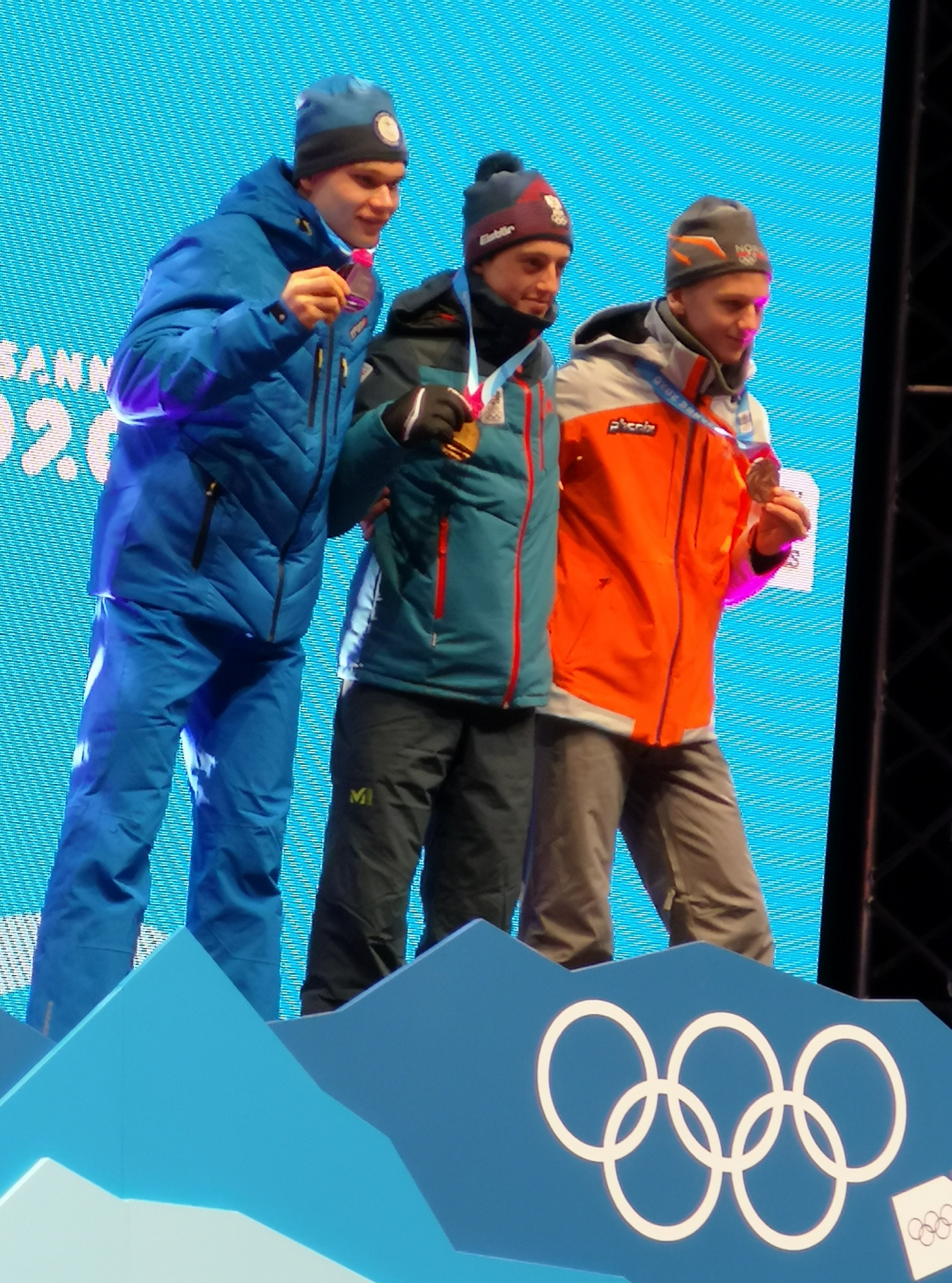 Le podium du combiné nordique masculin individuel aux JOJ de Lausanne 2020 : Stefan Rettenegger (AUT), Perttu Reponen (FIN) et Sebastian Østvold (NOR).